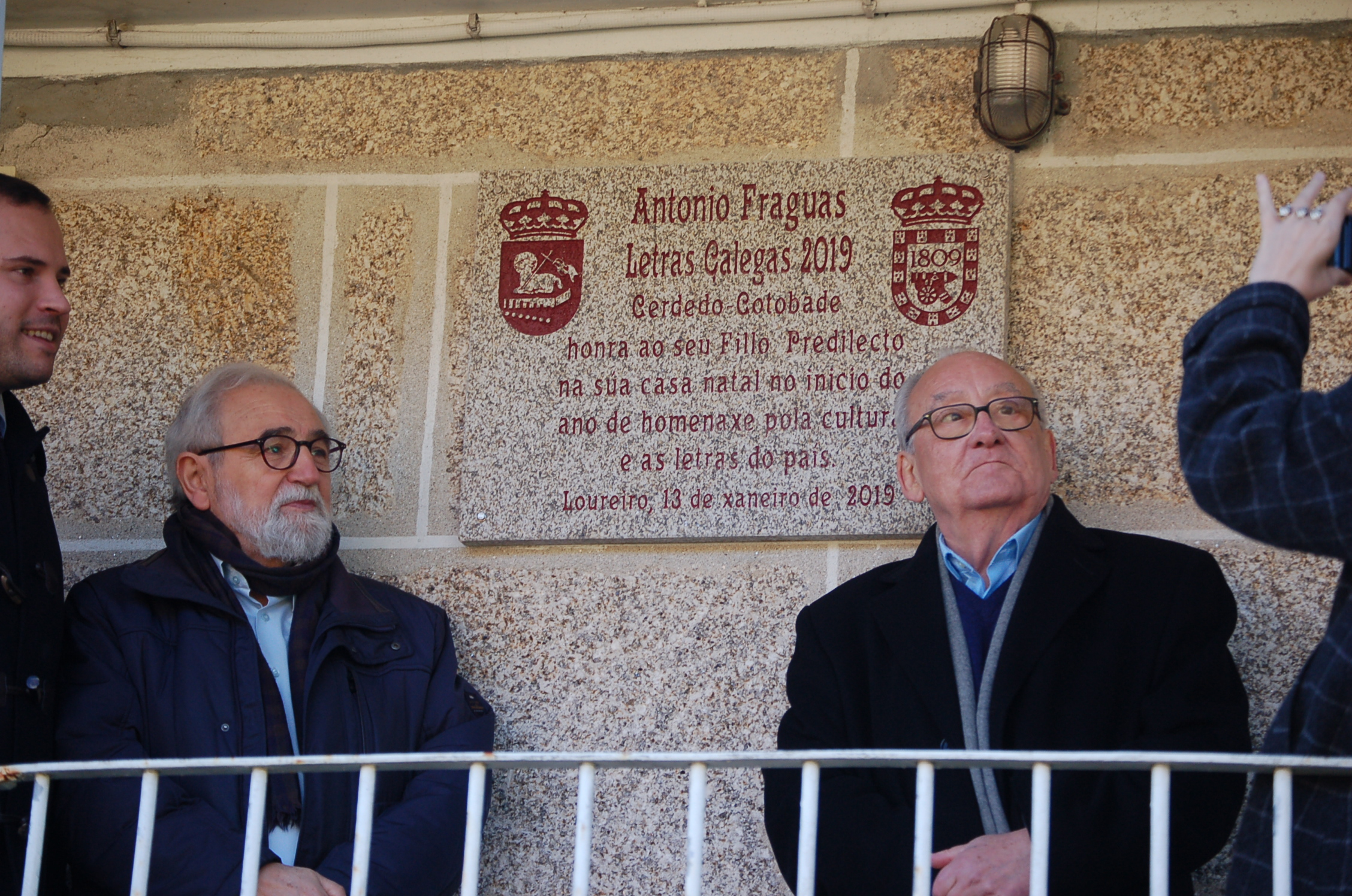 Clodio González Pérez e Xusto Beramendi na inauguración dos actos do Día das Letras Galegas 2019 na Casa natal de Antonio Fraguas en Insuela (Loureiro, Cotobade)